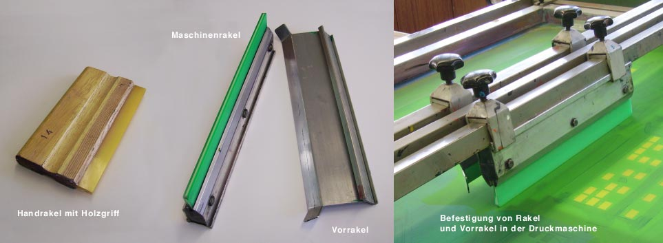 Siebdruckrakel